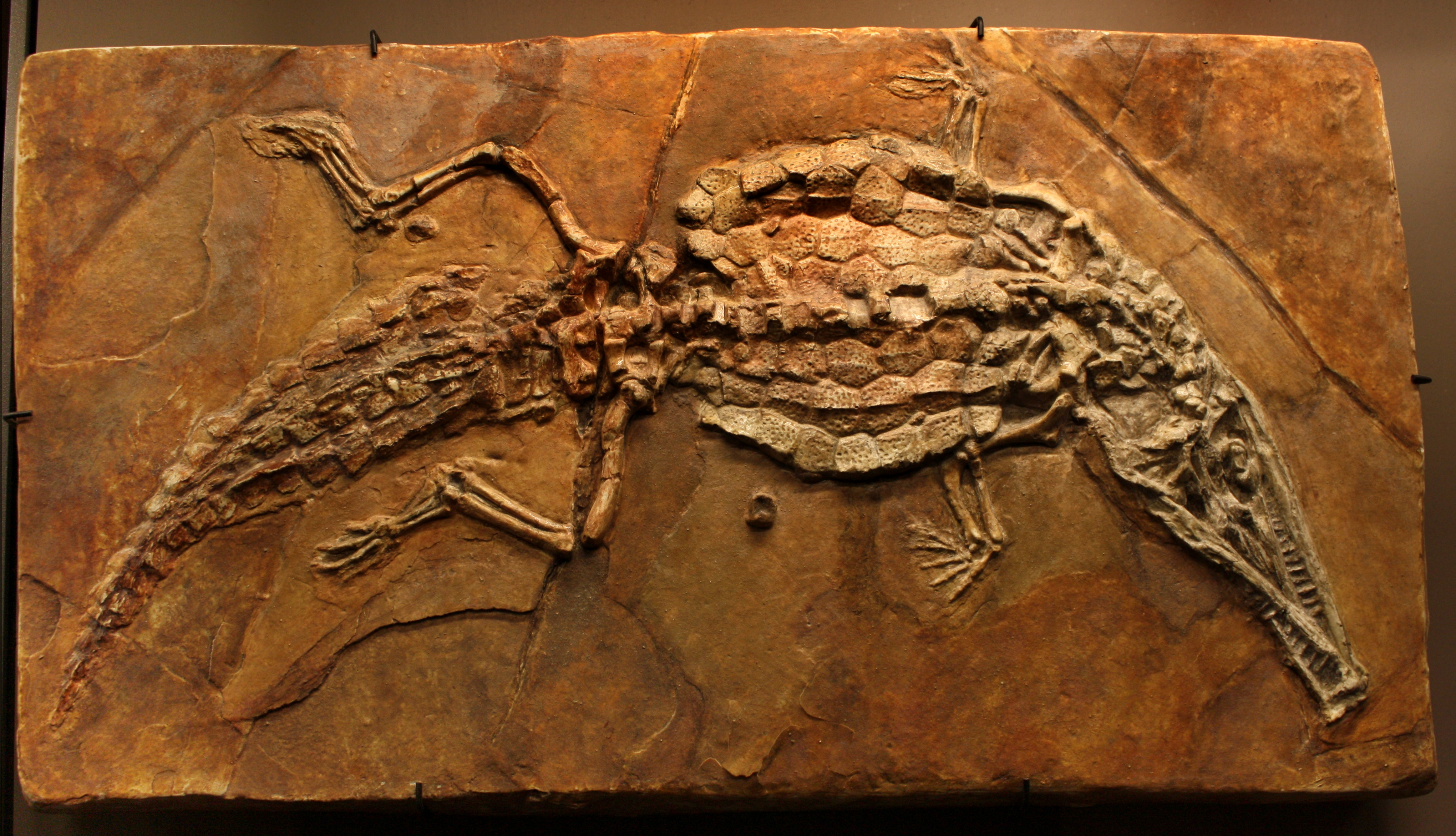 Moulage de Crocodileimus robustus, Cerin, France. Muséum de Lyon. Muséum de sciences naturelles de Bruxelles, Belgique. Museum for Natural Sciences of Belgium Native nameMuséum des sciences naturelles de BelgiqueLocationBrusselsCoordinates50° 50′ 13.4″ N, 4° 22′ 34.2″ E Established1846Web page control : Q222297 VIAF: 141862693 ISNI: 0000 0001 2171 9581 LCCN: n50056941 SUDOC: 027912310 BNF: 11985256w WorldCat institution QS:P195,Q222297